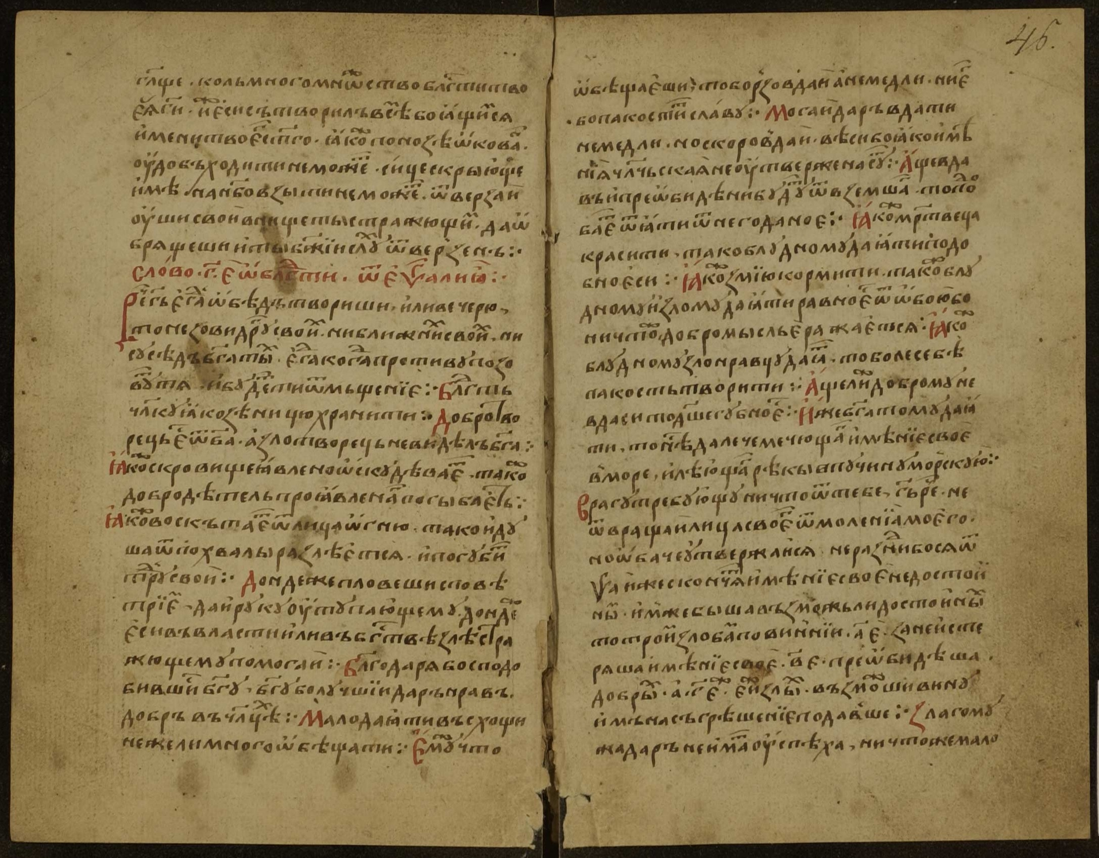 Рукопись № 735. (1922). Пчела преп. Максима с прибавлениями, полууст., ХVІ века, в четверть, 157 листов, без начала и конца. Фонд 304.I. Главное собрание библиотеки Троице-Сергиевой лавры.